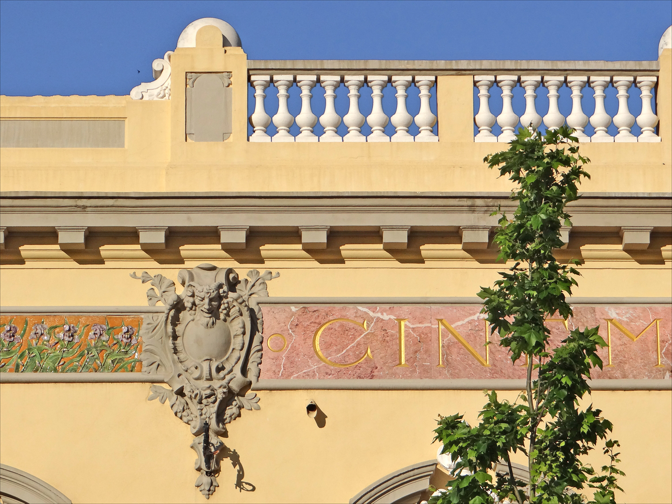 Détail de la façade du cinéma art nouveau : le Castillet Le Castillet est le plus ancien cinéma de Perpignan. Il a ouvert ses portes en 1911. Le bâtiment a été conçu dans le style "art nouveau" (moderniste) par l'architecte Montes sur commande de Joan Font, un catalan qui avait ouvert une salle de cinéma en 1906 à Barcelone. Les décors sculptés sont d'Auguste Guénot.